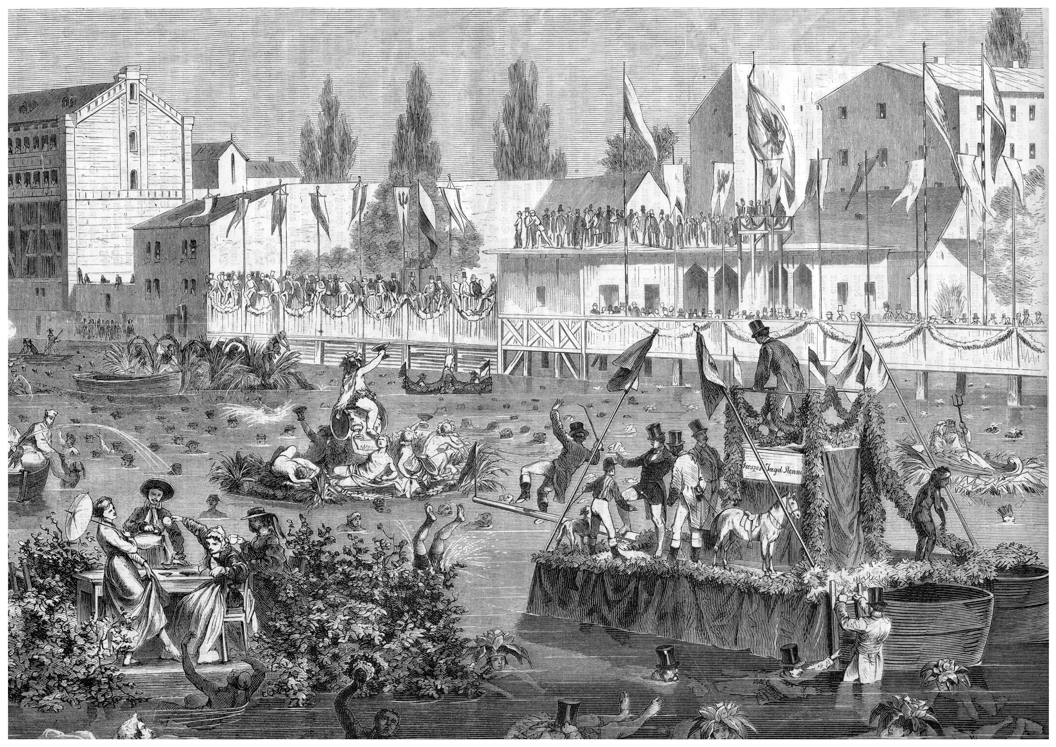 Die 50. Jubiläumsfeier der Pfuel'schen Schwimmanstalt, 1867 in Berlin.